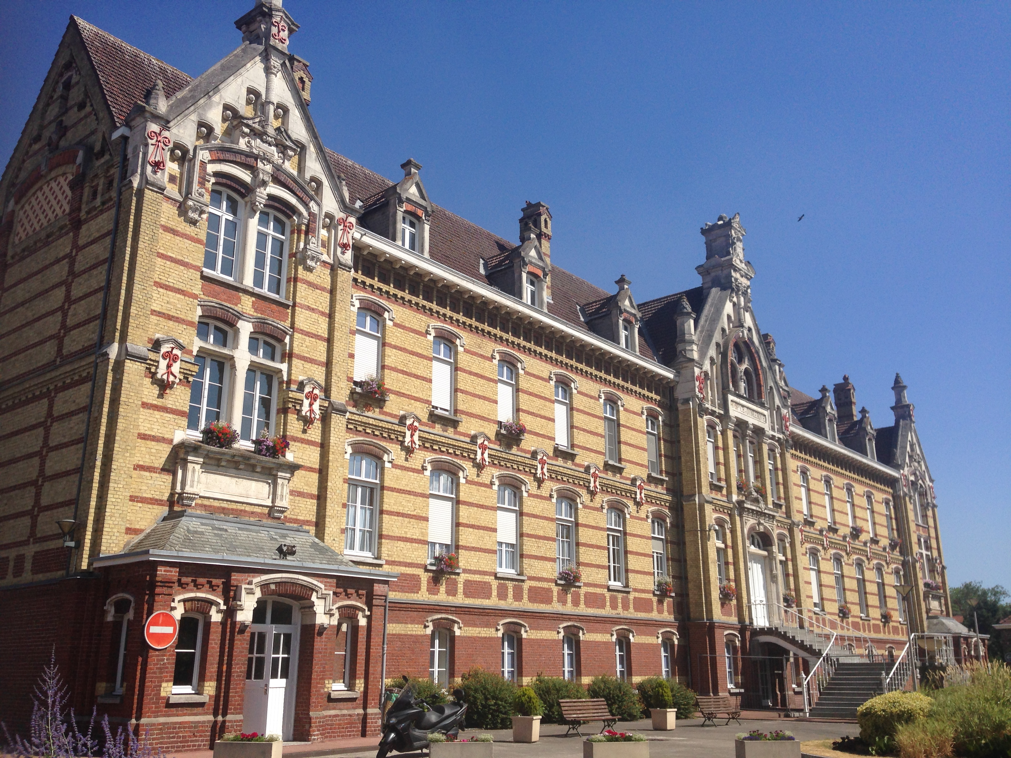 Architecte Jules Lecocq et Jean Morel